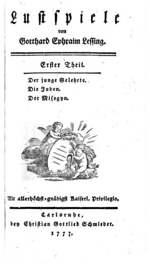 Wie dem Titelblatt unschwer zu entnehmen ist, handelt es sich um einen nichtauthorisierten Raubdruck einer Werkausgabe Lessings aus dem 18. Jahrhundert. Statt Gotthold Ephraim Lessing heißt es dort Gotthard Ephraim Lessing. Die authorisierten Werke Lessings, wie auch dieser Band der "Lustspiele", erschienen seinerzeit bei Christian Friedrich Voß in Berlin.